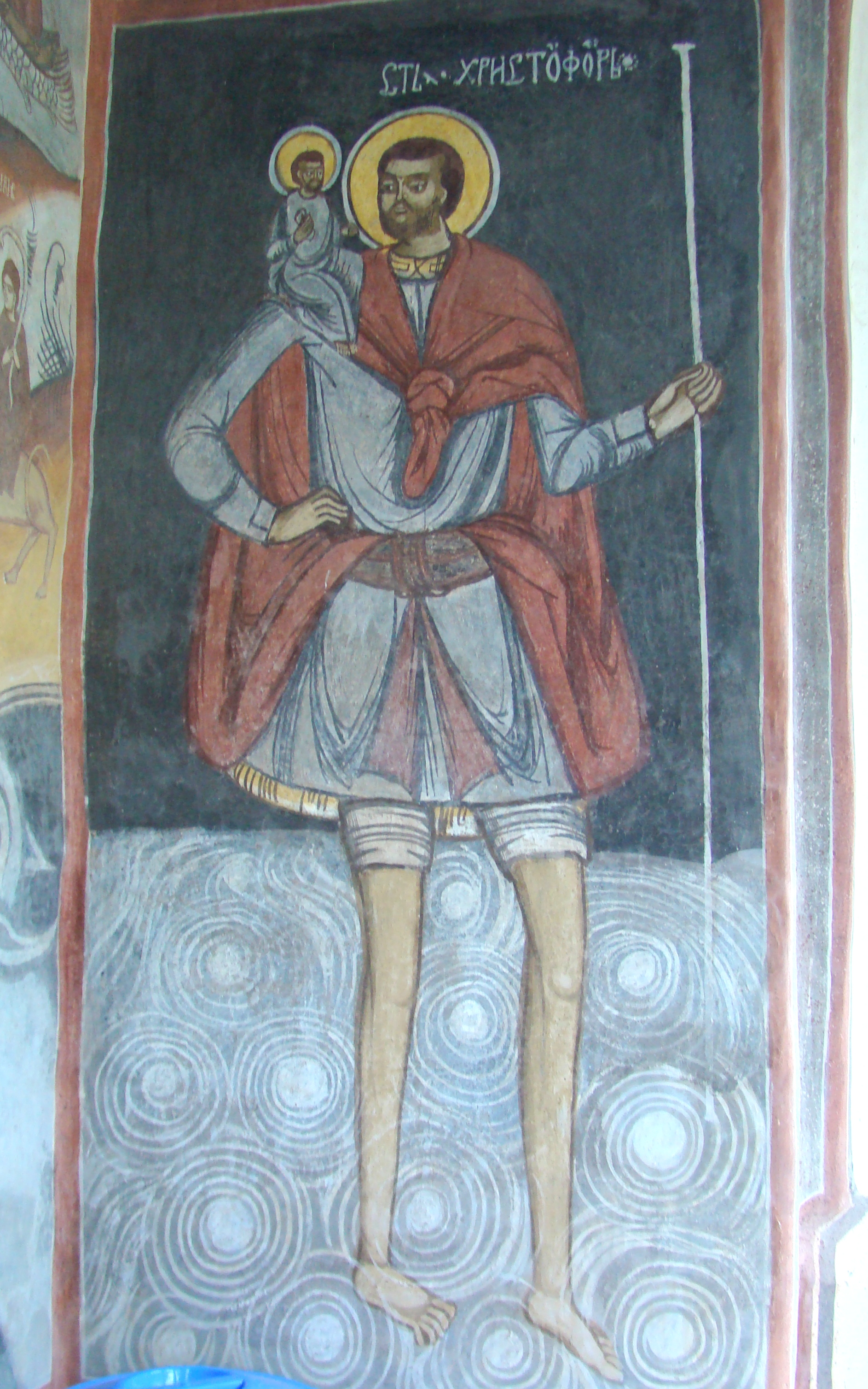 Biserica „Sfinţii Ioachim și Ana”, sat Târgu Logrești; comuna Logrești 01